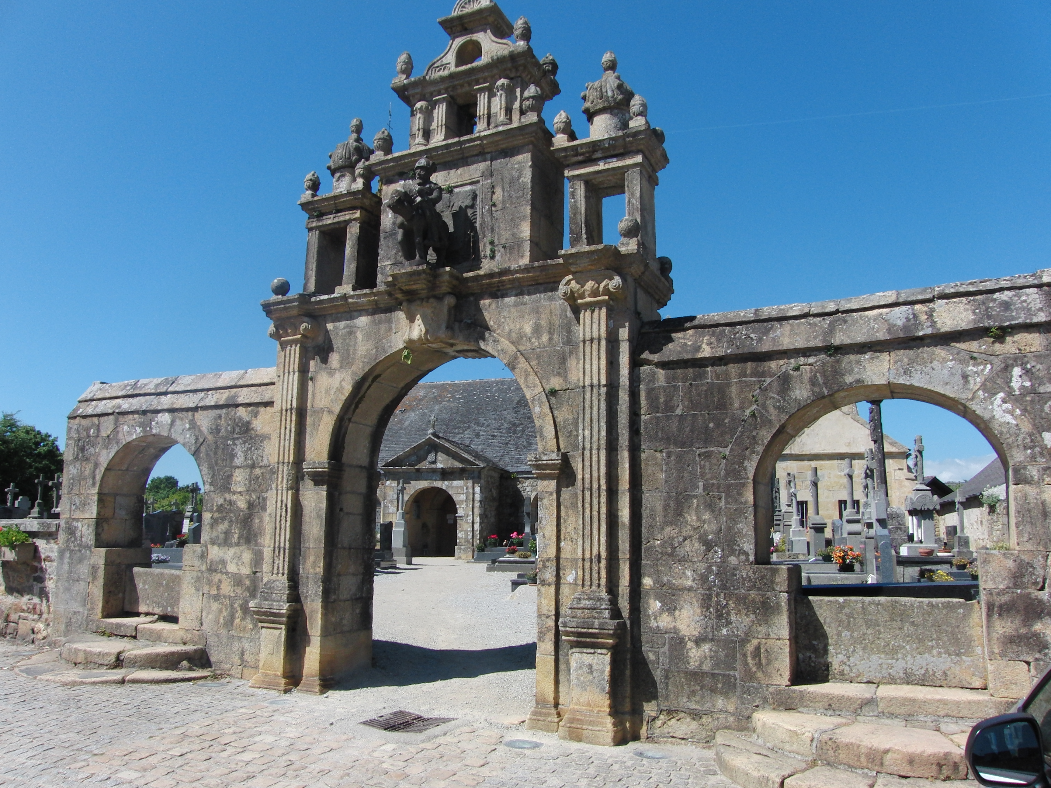 Argol, l'arc de triomphe Finistère